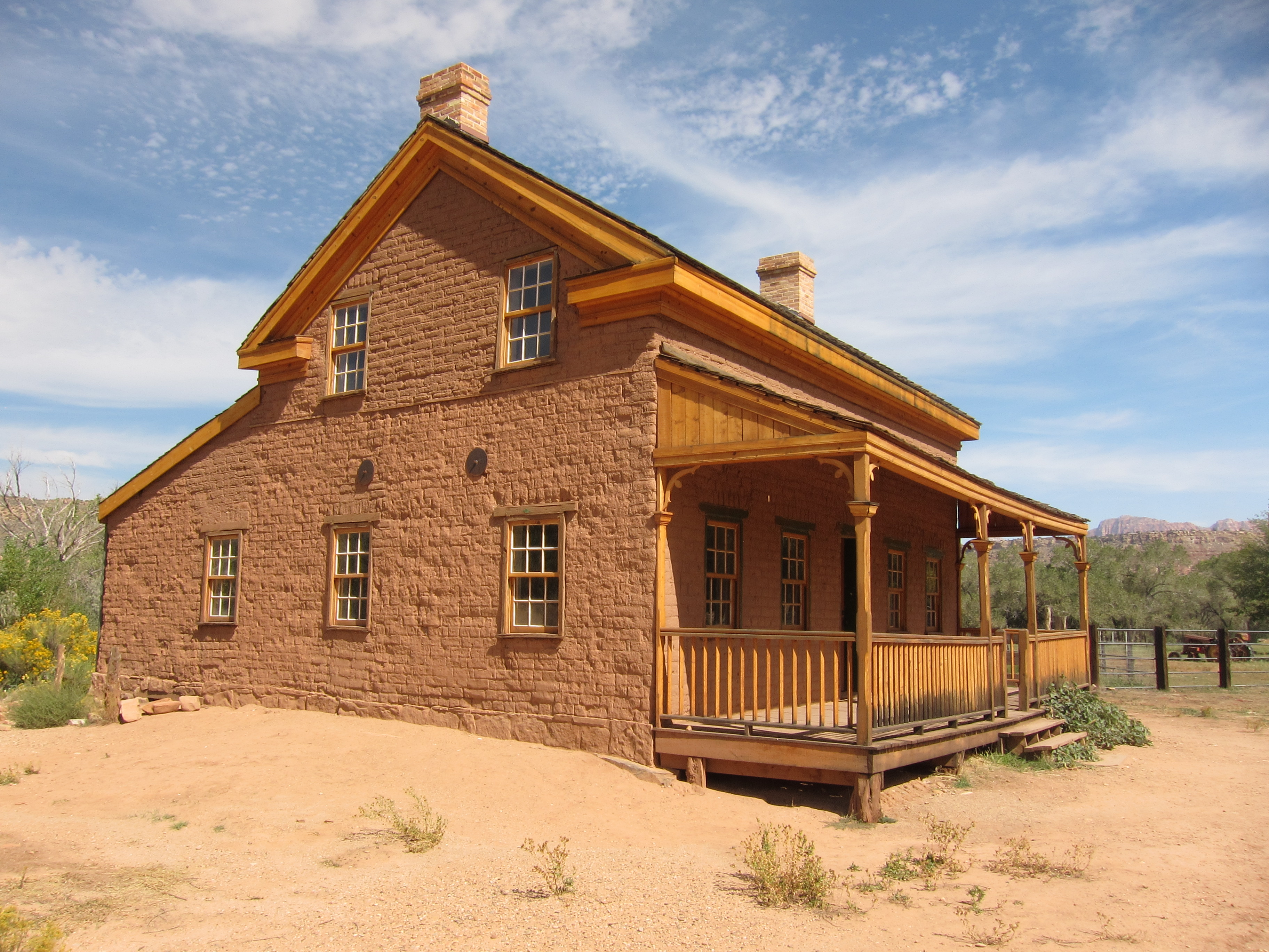 Grafton (Utah) ville fantome. Maison restaurée en 2004